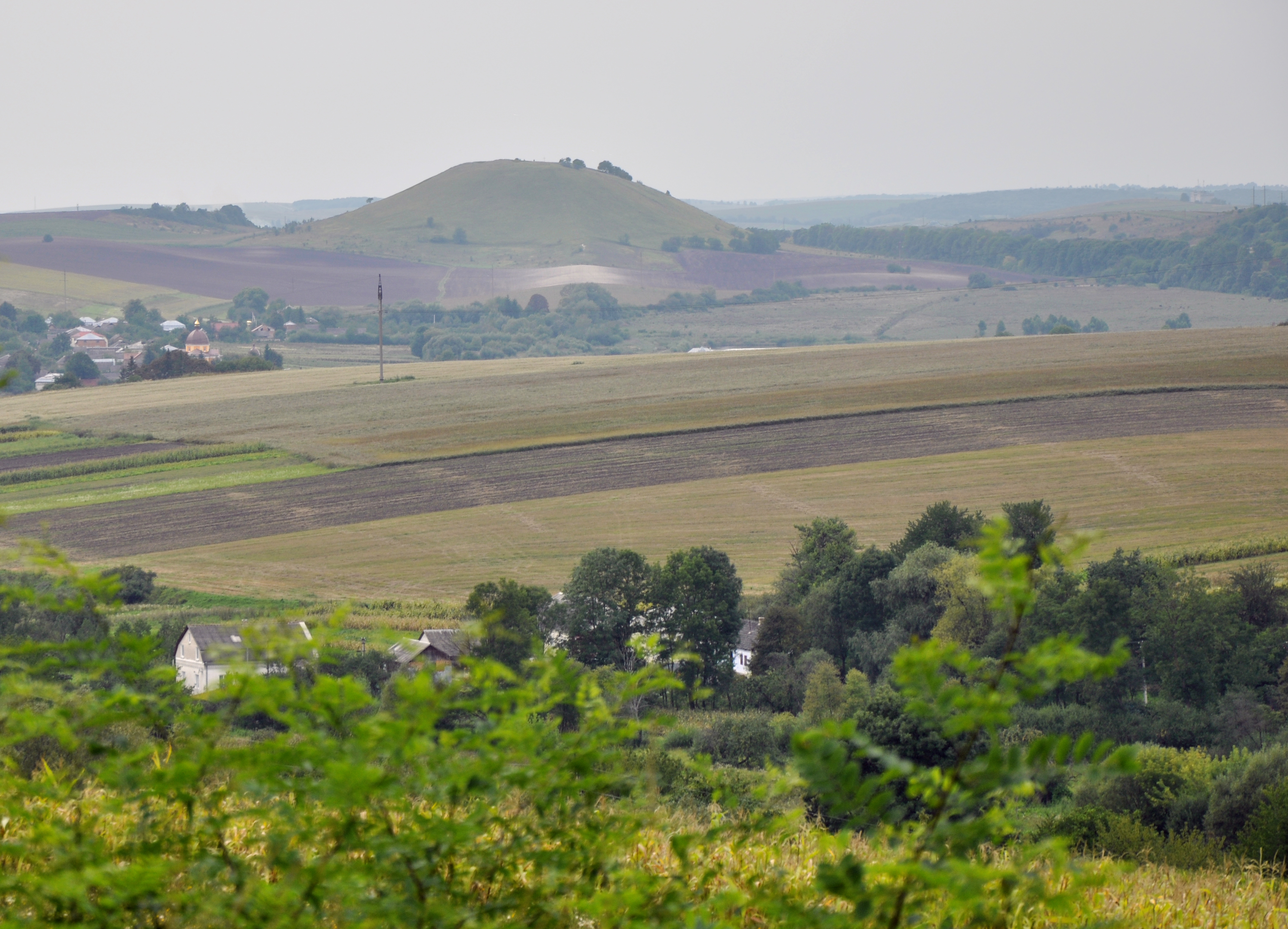 «Чортова Гора», Рогатинський район село Підвиння (9,5 га); село Пуків (3,5 га)